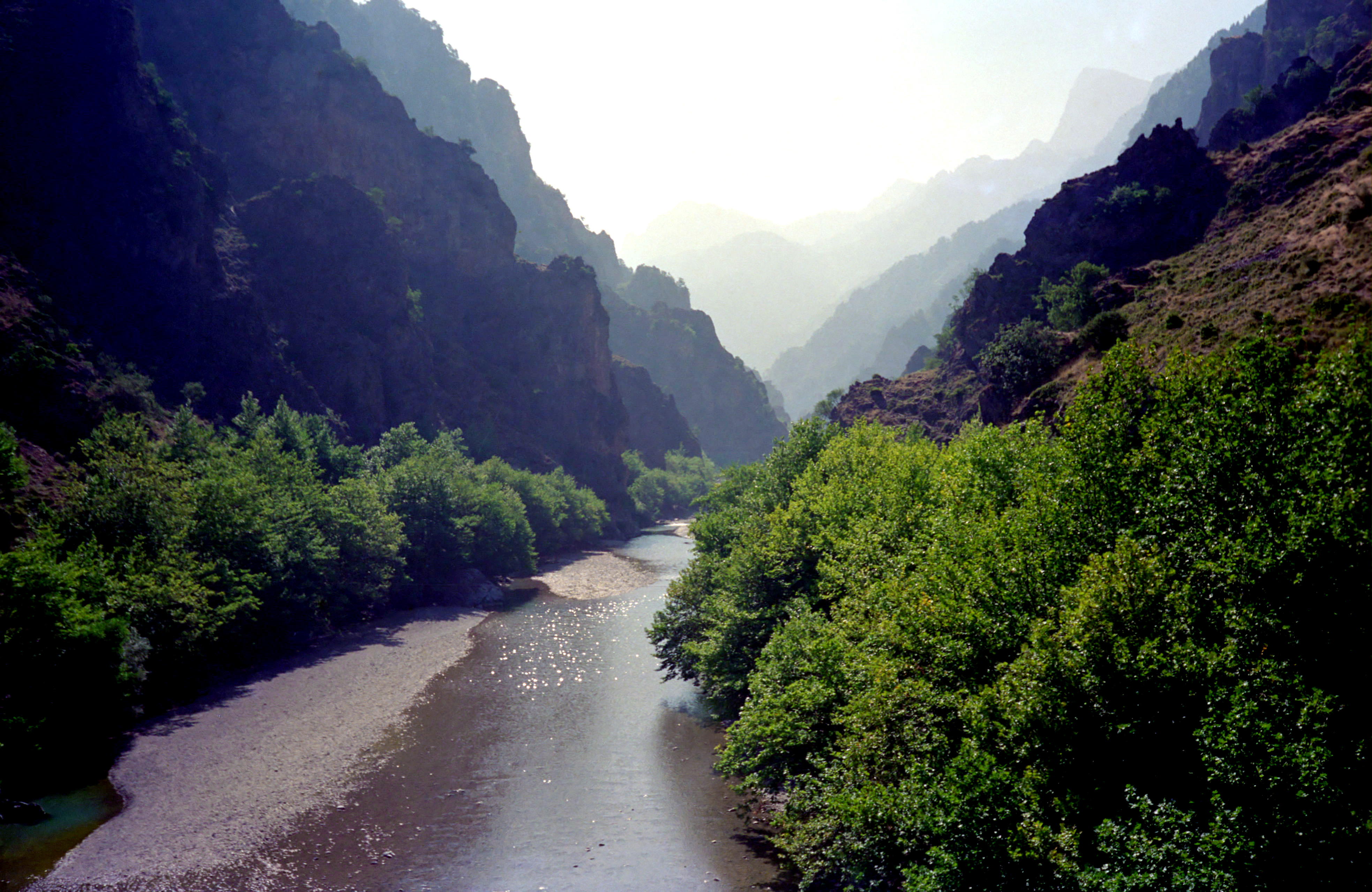 Ο ποταμός Αώος στην ομώνυμη χαράδρα This is a photography of Natura 2000 protected area with ID GR2130001